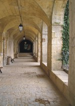 Voute du Château de Fumel